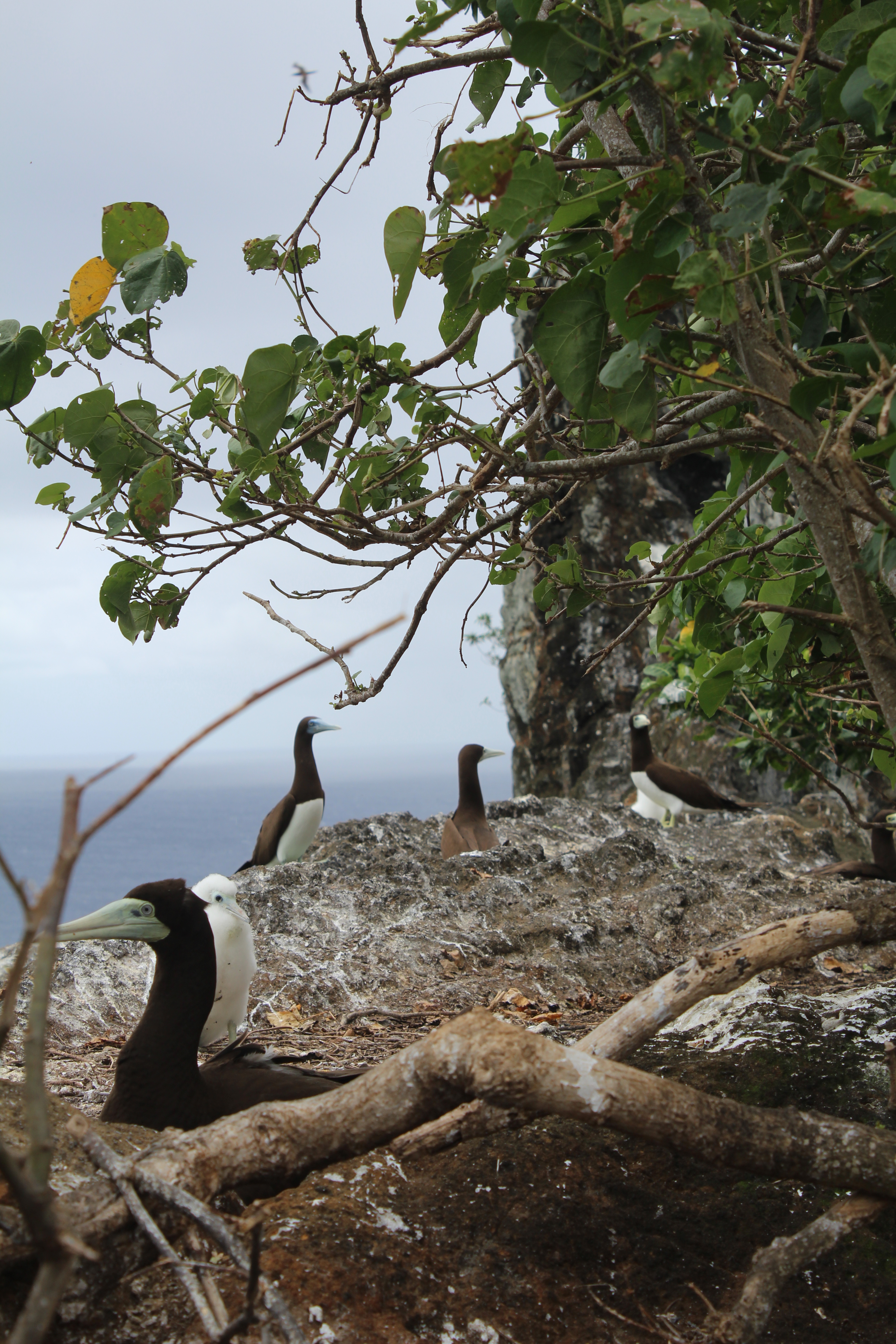 Nukufotu est un îlot situé dans le lagon Nord de Wallis, et qui abrite une grande diversité d'oiseaux - qui sont d'ailleurs les seuls habitants de l'île. Il est possible de les observer à tout moment de l'année.